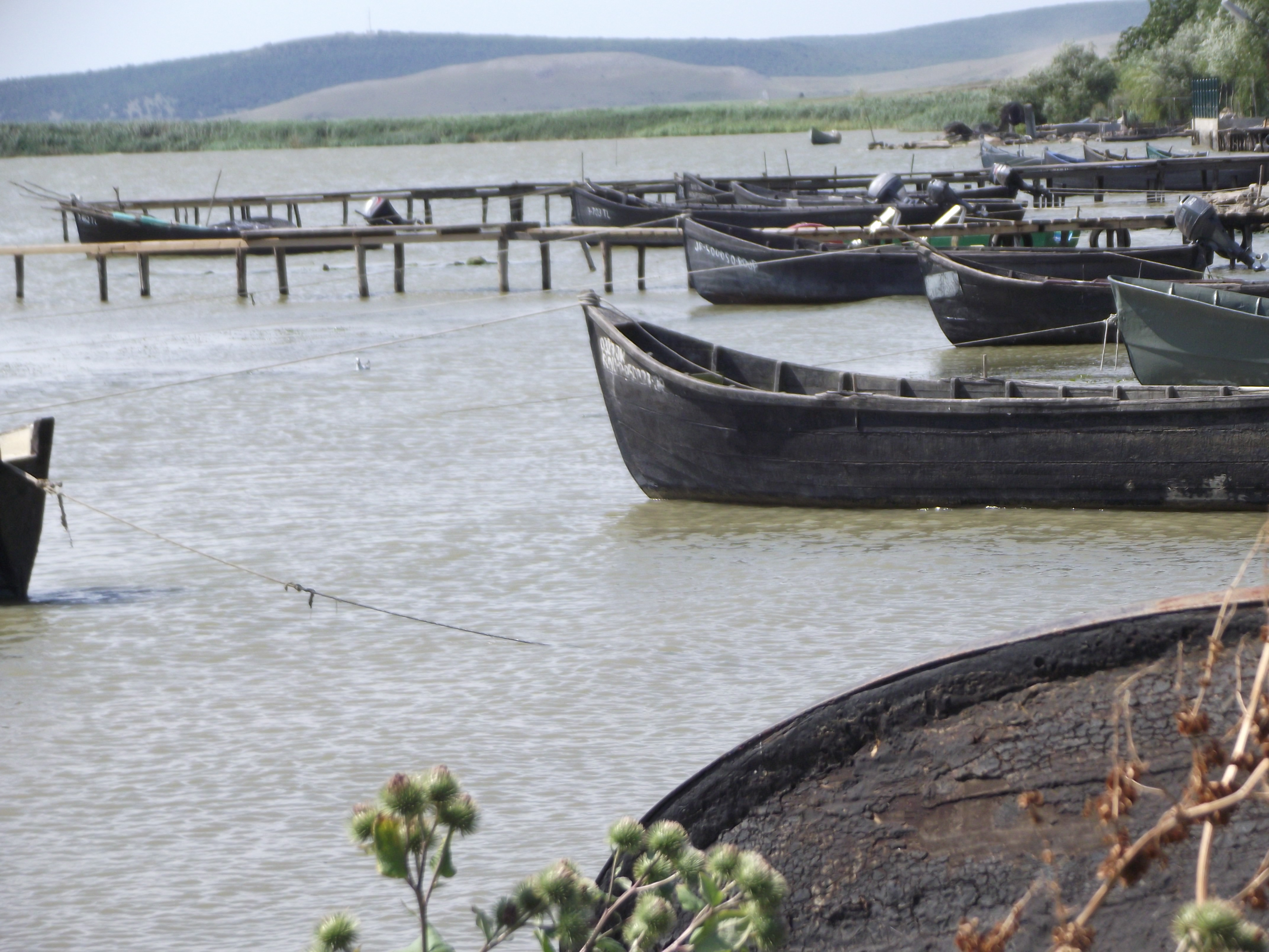 Fotografie a postului pescăresc din Sarichioi făcută în iulie 2013